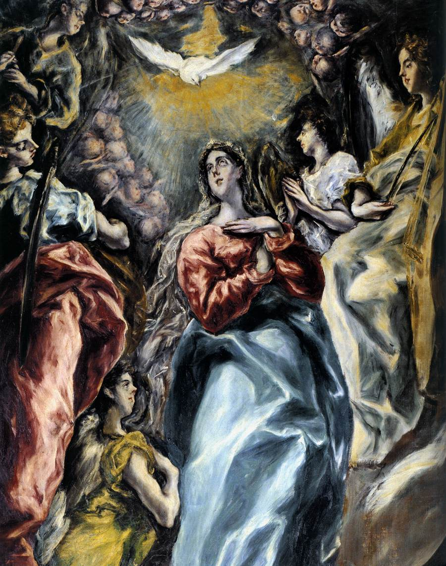 La obra representa la Inmaculada Concepción de la Virgen María.